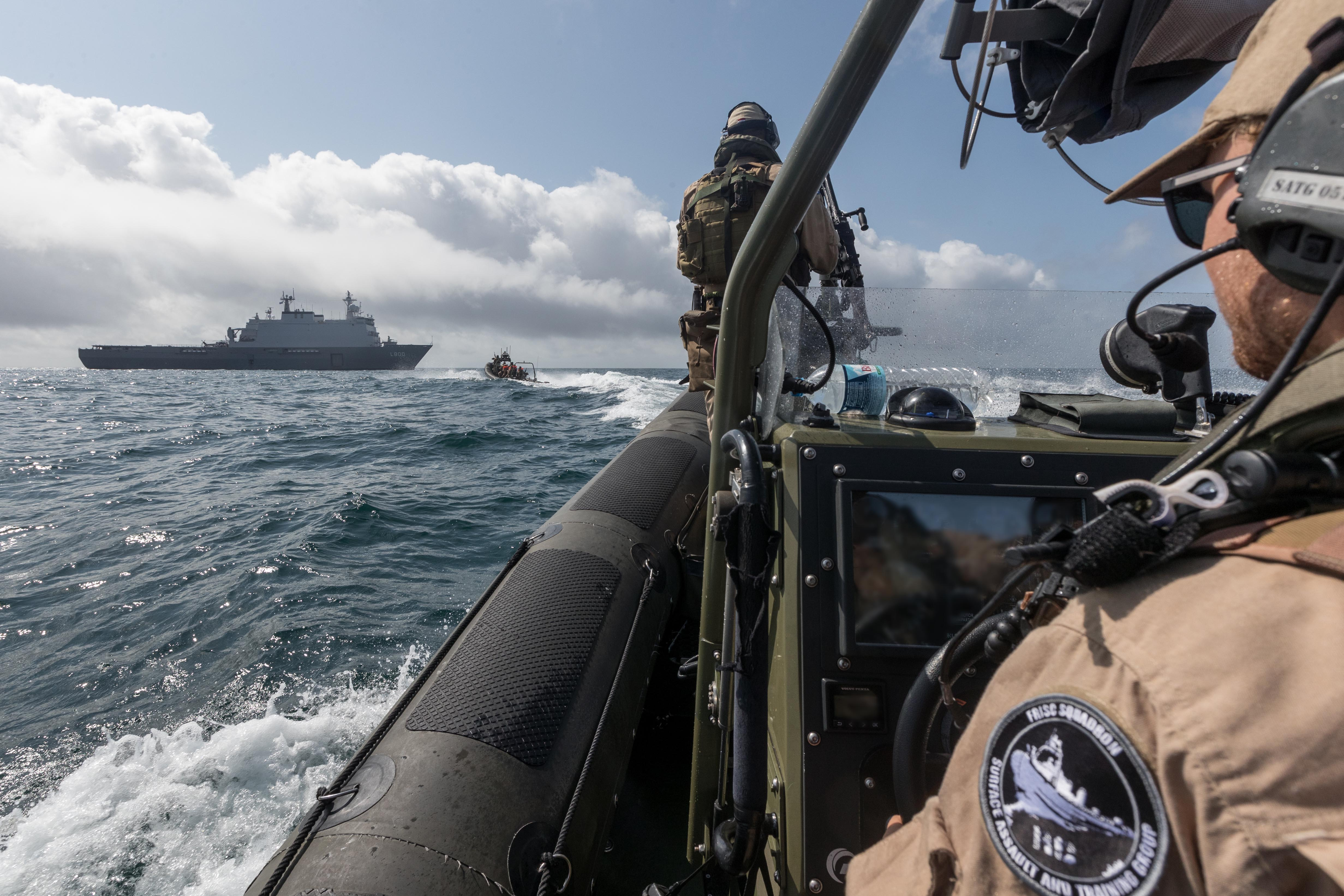 Somalië ter zee, 4 oktober 2017.Extractie Somaliëse kustwacht provincie Galmudug, stad Hobyo.Foto: Enkele leden van de Somaliëse kustwacht uit Hobyo werden door de FRISC's van de Zr.Ms. Rotterdam opgepikt en aan boord gebracht voor het volgen van een algemene training.